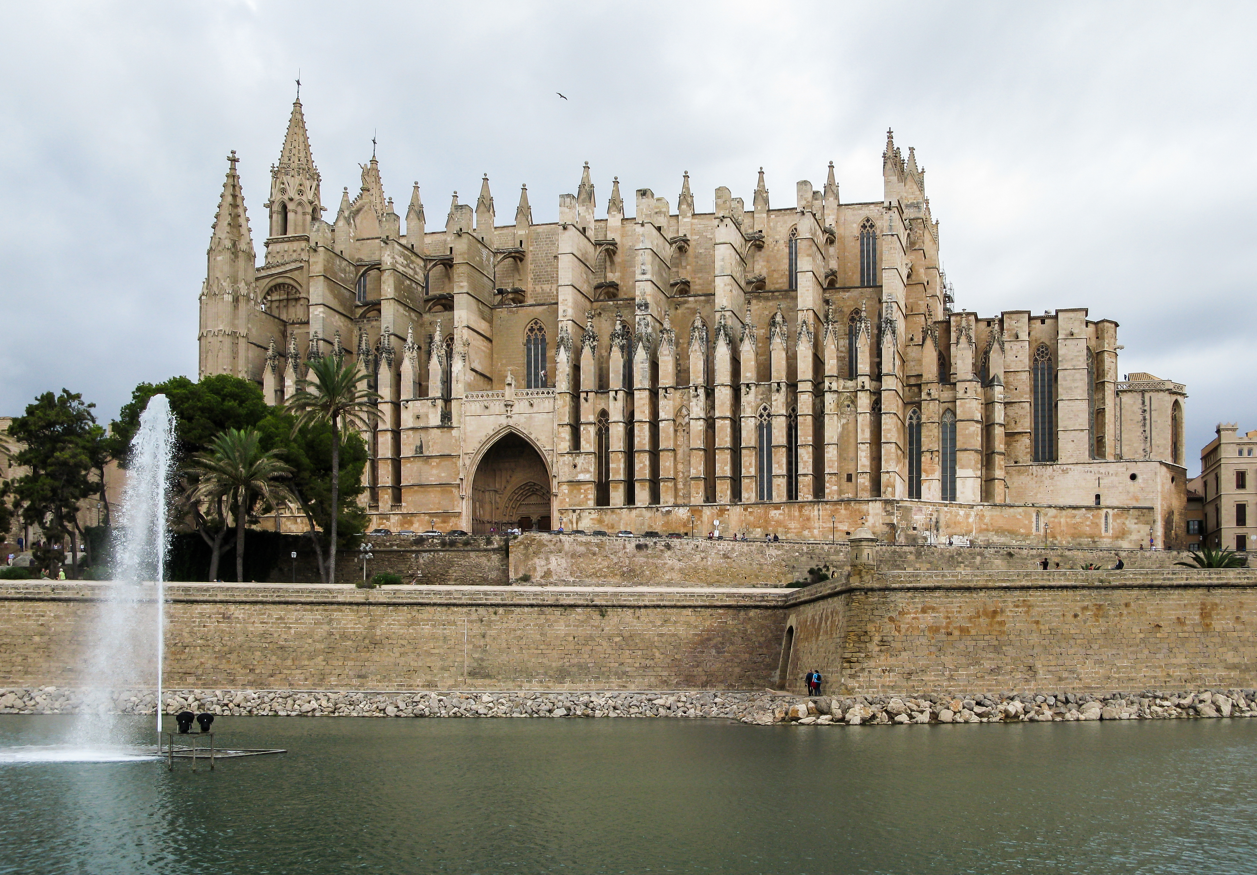 Palma de Mallorca, Kathedrale La Seu